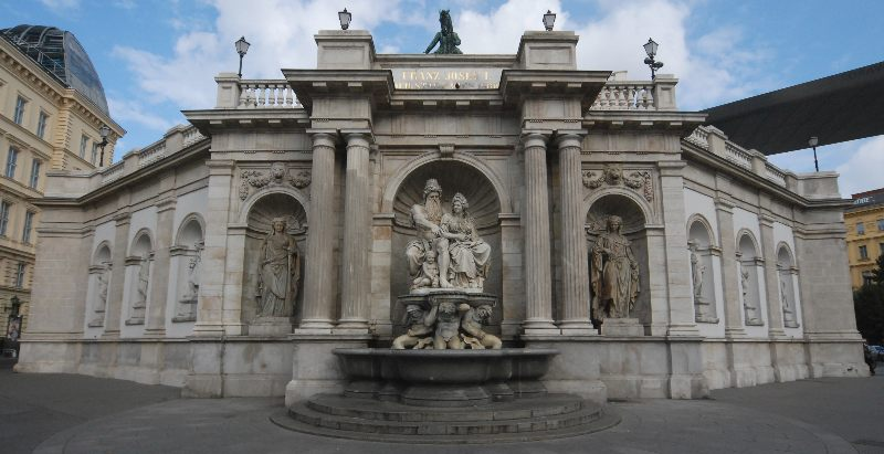 Der Albrechtsbrunnen, auch Danubiusbrunnen genannt, ist ein Brunnen im 1. Wiener Gemeindebezirk